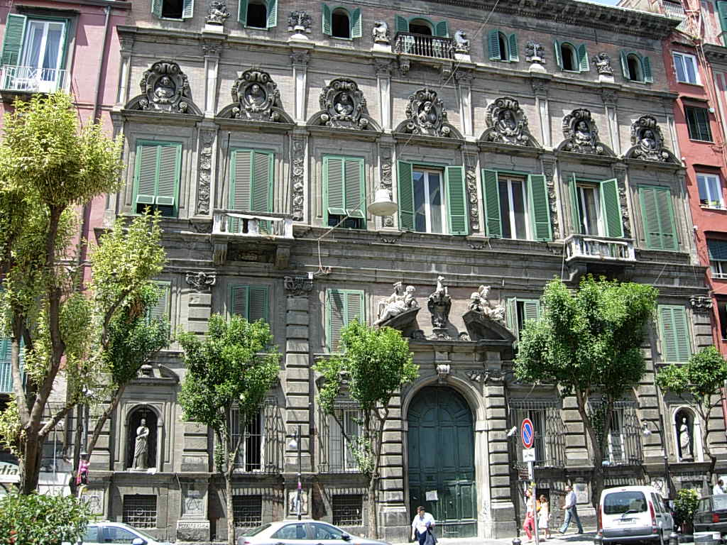 Palazzo Firrao in Napoli Foto personale concessa in PD